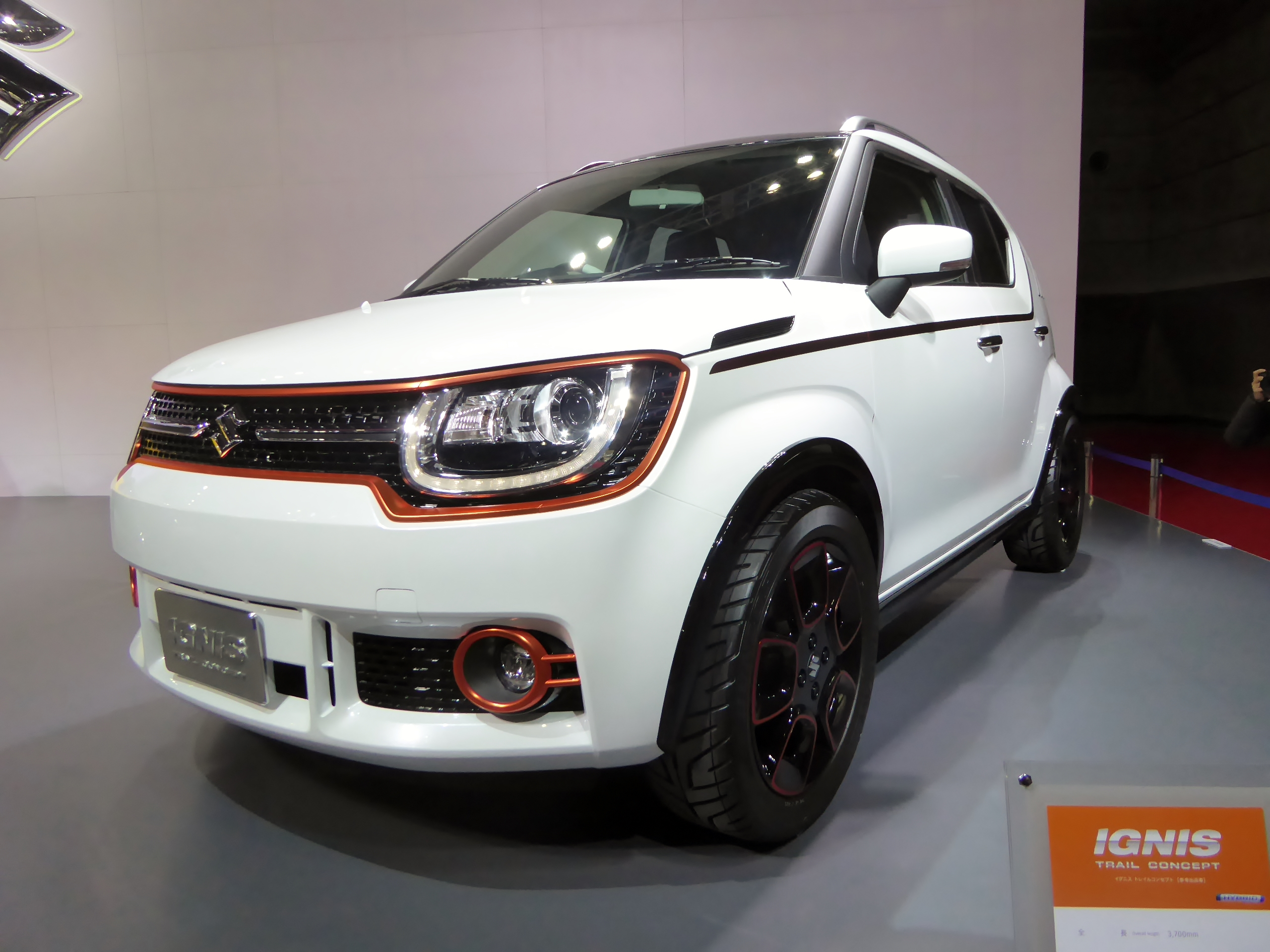 大阪モーターショー2015においてスズキ・イグニストレイルコンセプトを撮影。